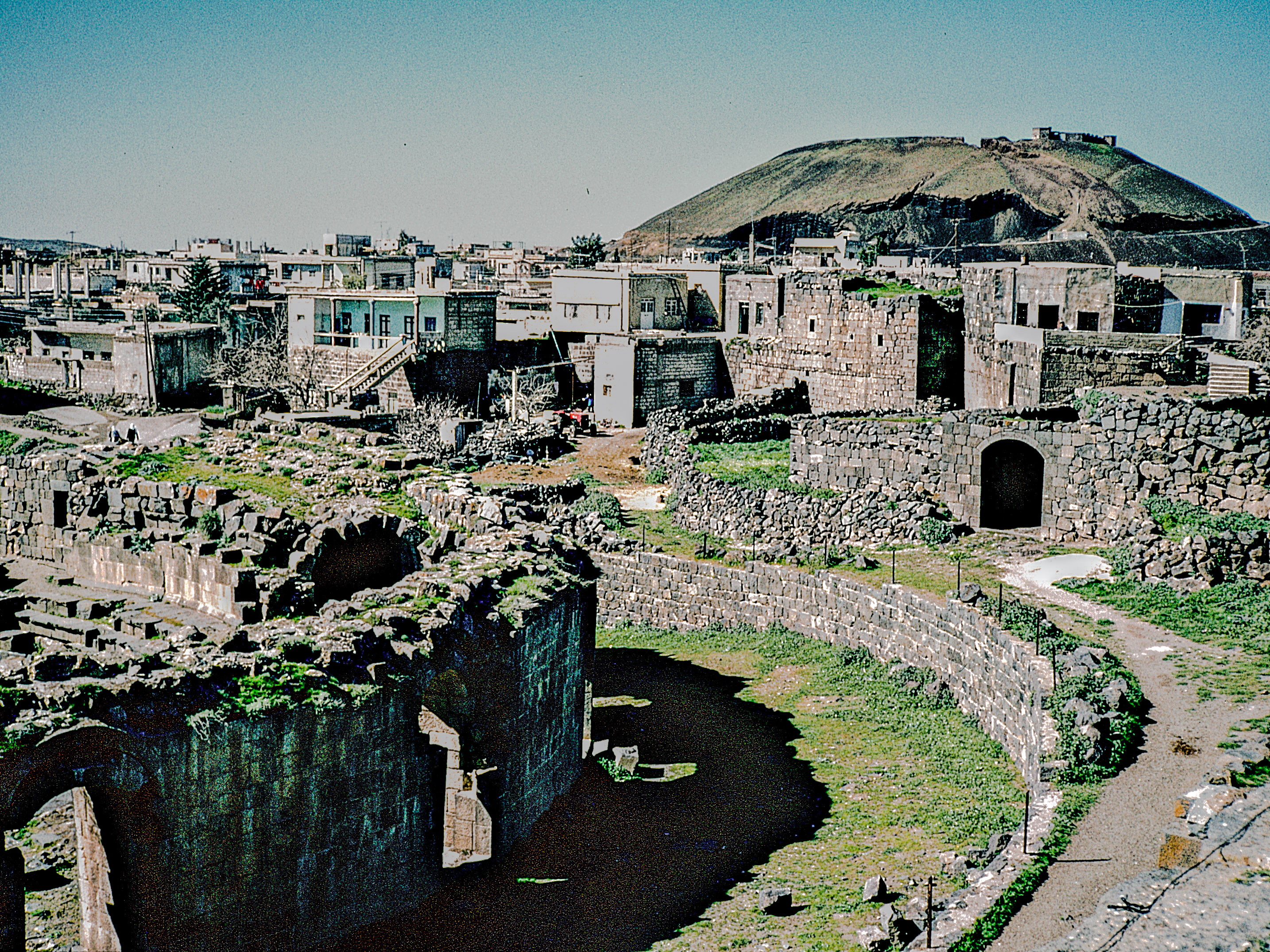 Antikes Ruinenfeld und neuzeitliche Wohnhäuser am Stadtrand von Bosra in der Basaltlandschaft des Hauran